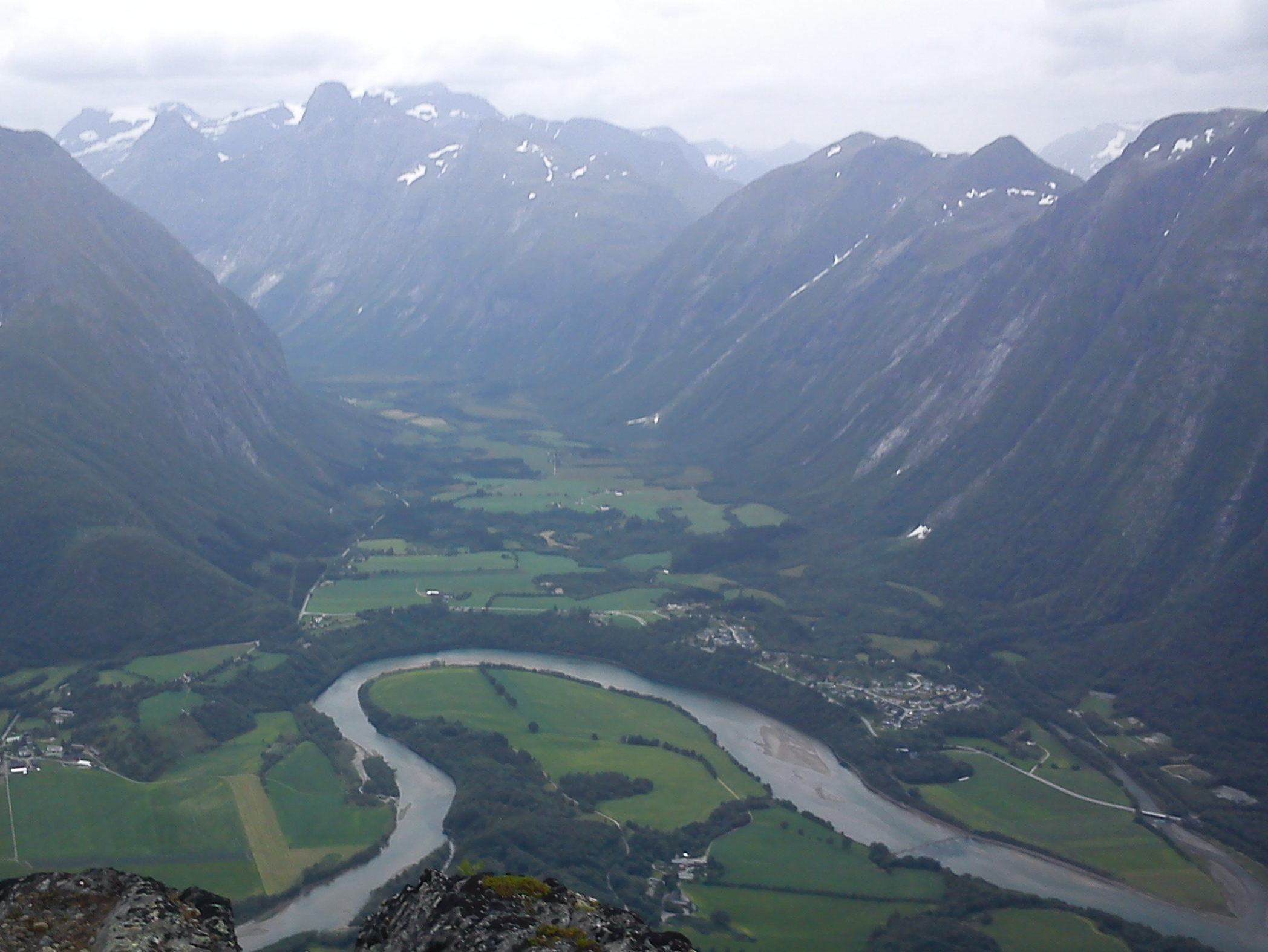 Rauma, Norway